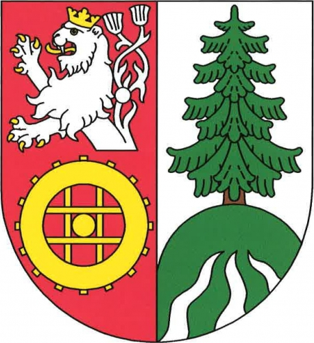 znak, Rovná, okres Sokolov